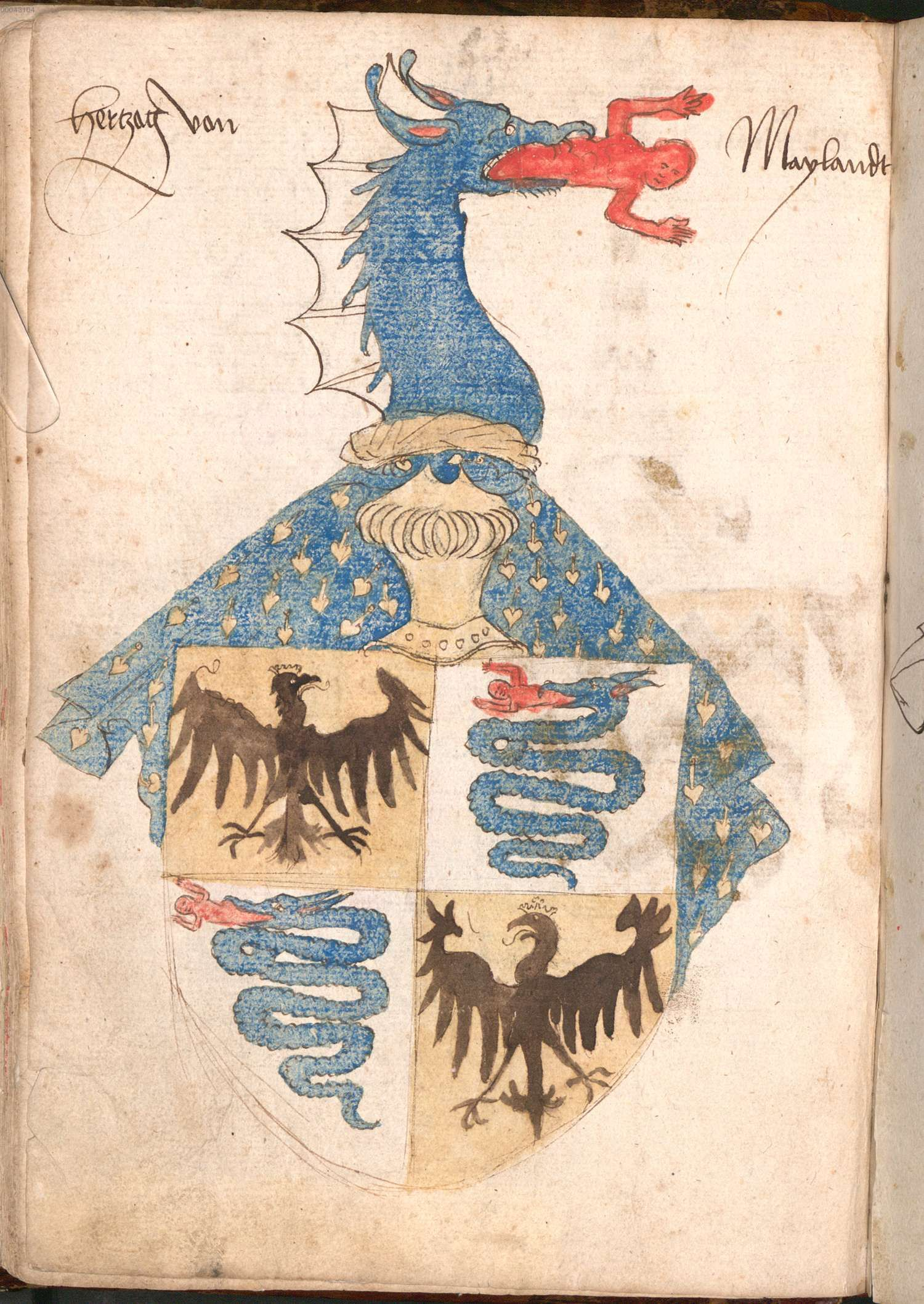 „Wernigeroder (Schaffhausensches) Wappenbuch“; Süddeutschland 4. Viertel 15. Jh. Bayerische Staatsbibliothek München, Cod.icon. 308 n Wappen des Herzog von Mailand, Sforza